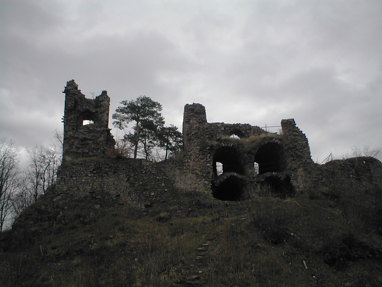 Čelní pohled na zříceninu hradu Zubštejn.